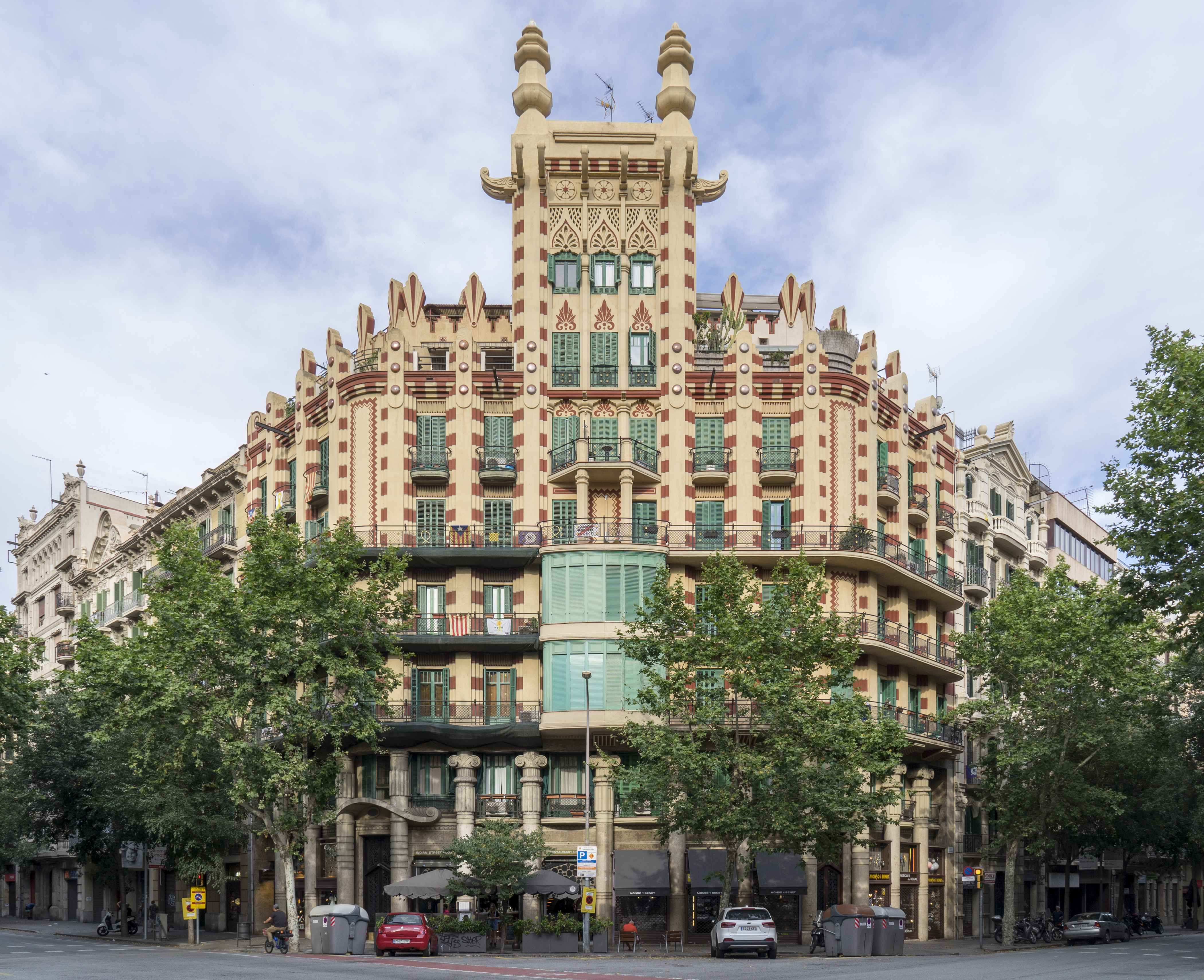 Casa Ferran Guardiola, Barcelona